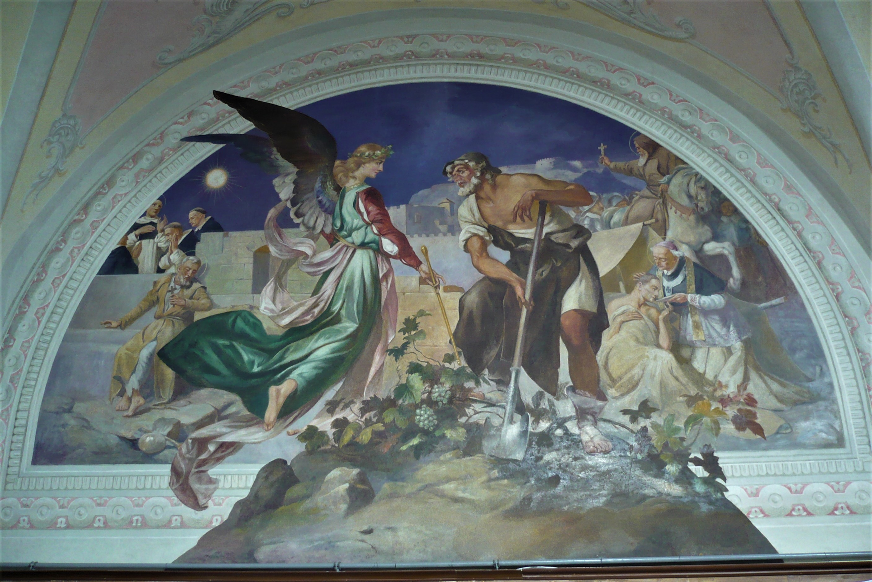 Klasztor dominikanów we Lwowie. Malowidło ścienne